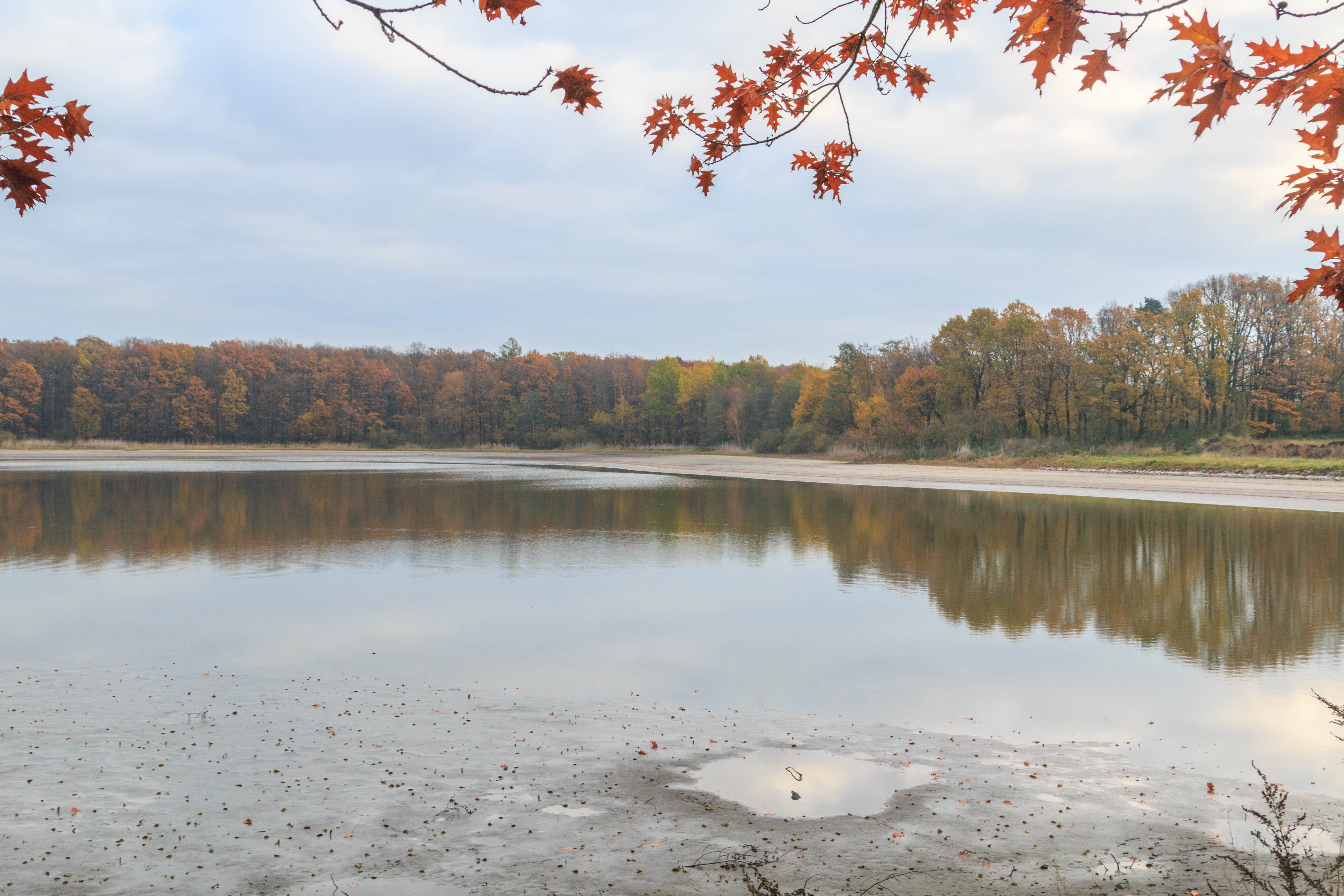 rybník Skříň Project: Vodstvo.